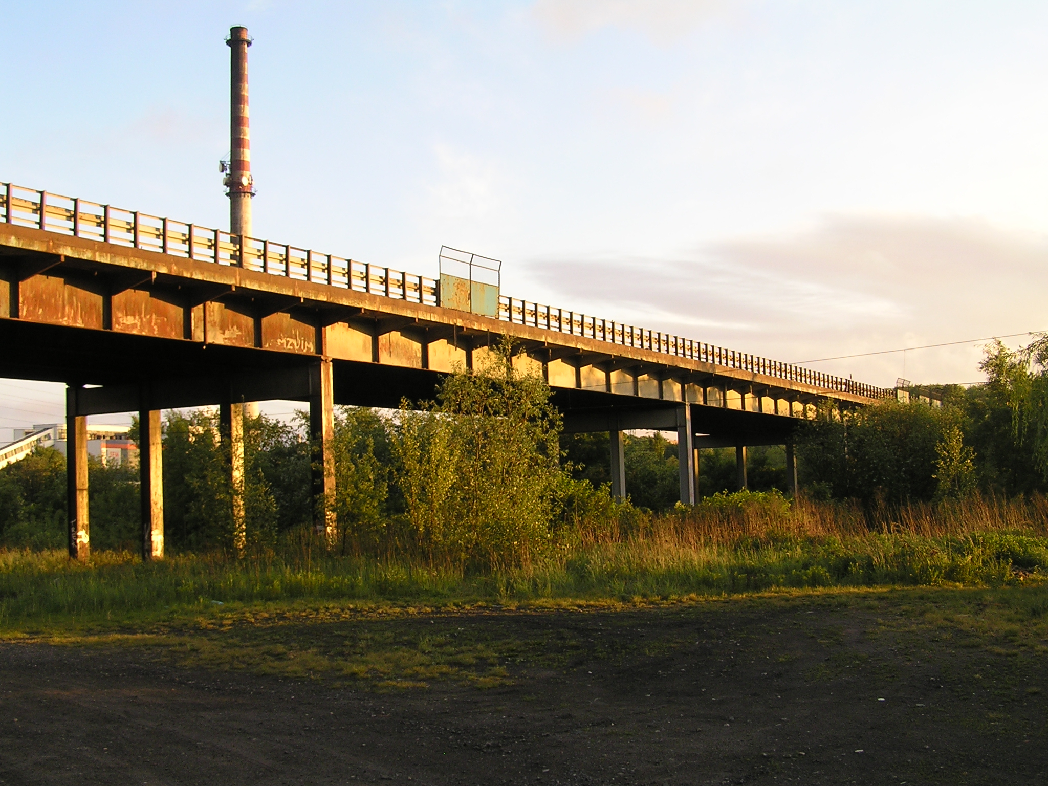 Wiadukt kolejowy wybudowany w latach 1941-1944 na DK 88 w Gliwicach. Na zdjęciu stan z 2009r. Wiadukt przetrwał bez zmian przez 70 lat. Wybudowany przez wiezniow obozow koncentracyjnych na owczesnej Autostradzie RAB no 9. W latach 2010-2012 rozebrany i wybudowany od nowa